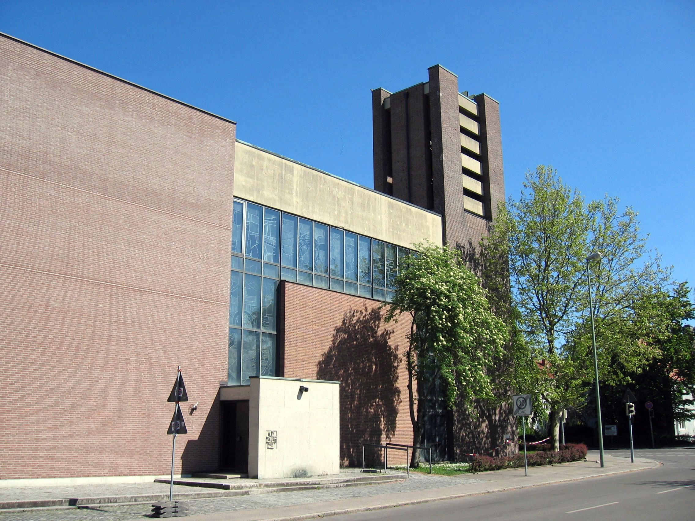 Zusehen ist die Piuskirche in Haunstetten